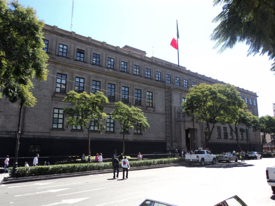 suprema corte de justicia de la nacion